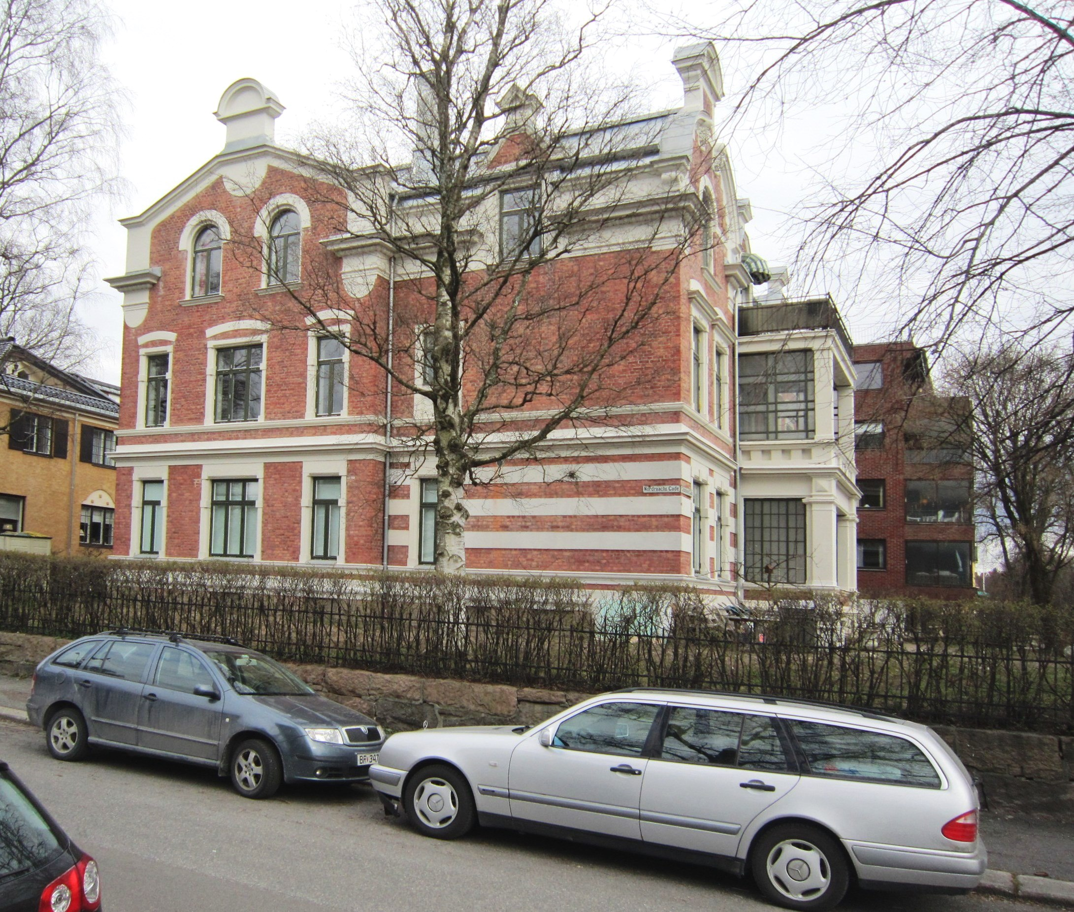 Gyldenløves gate 47 sett fra Nordraaks gate. Arkitekt: Carl Michalsen (1891).